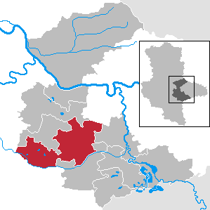 Südliches Anhalt in Sachsen-Anhalt - Landkreis Anhalt-Bitterfeld